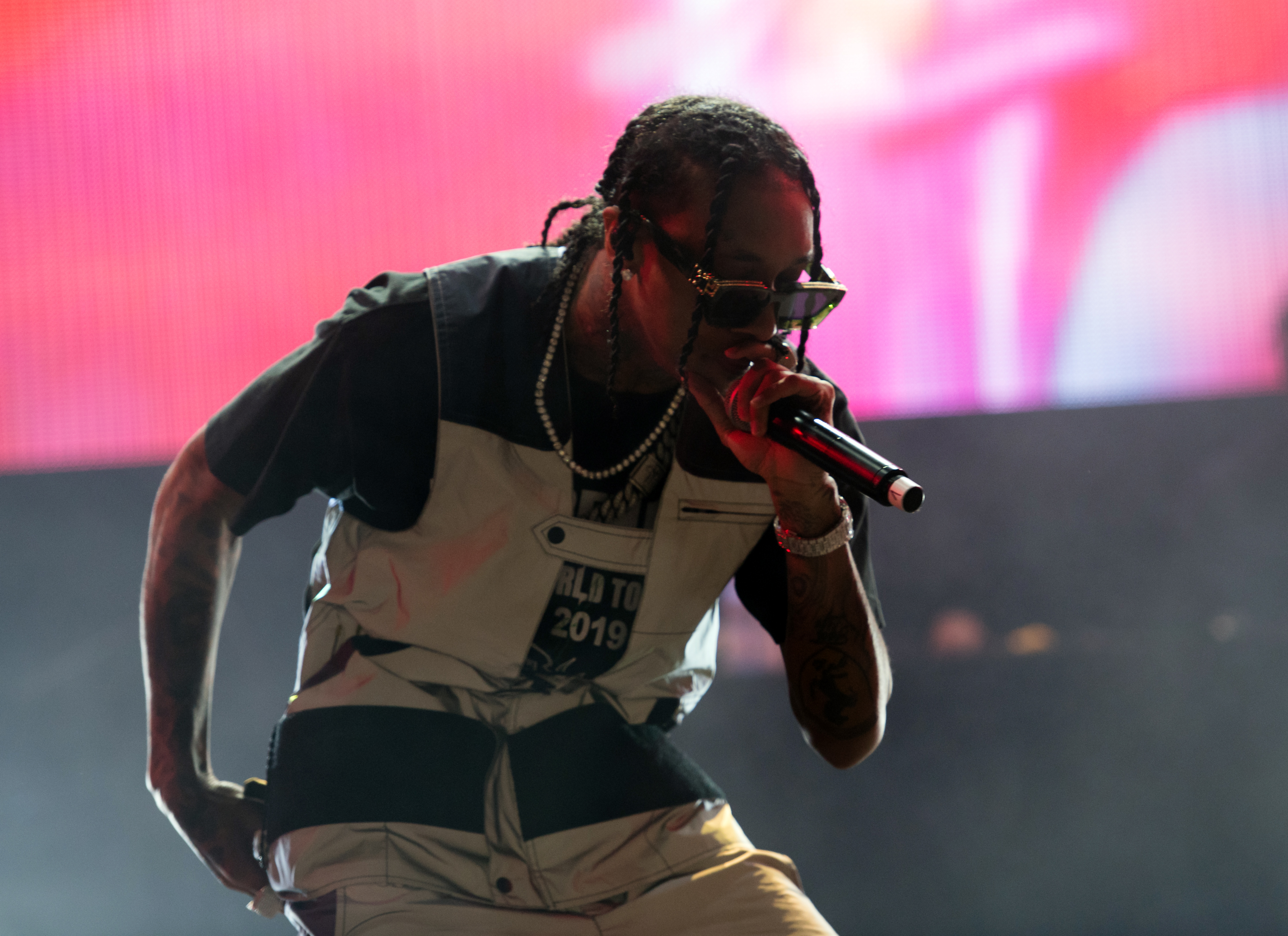 Tyga live auf dem Openair Frauenfeld 2019